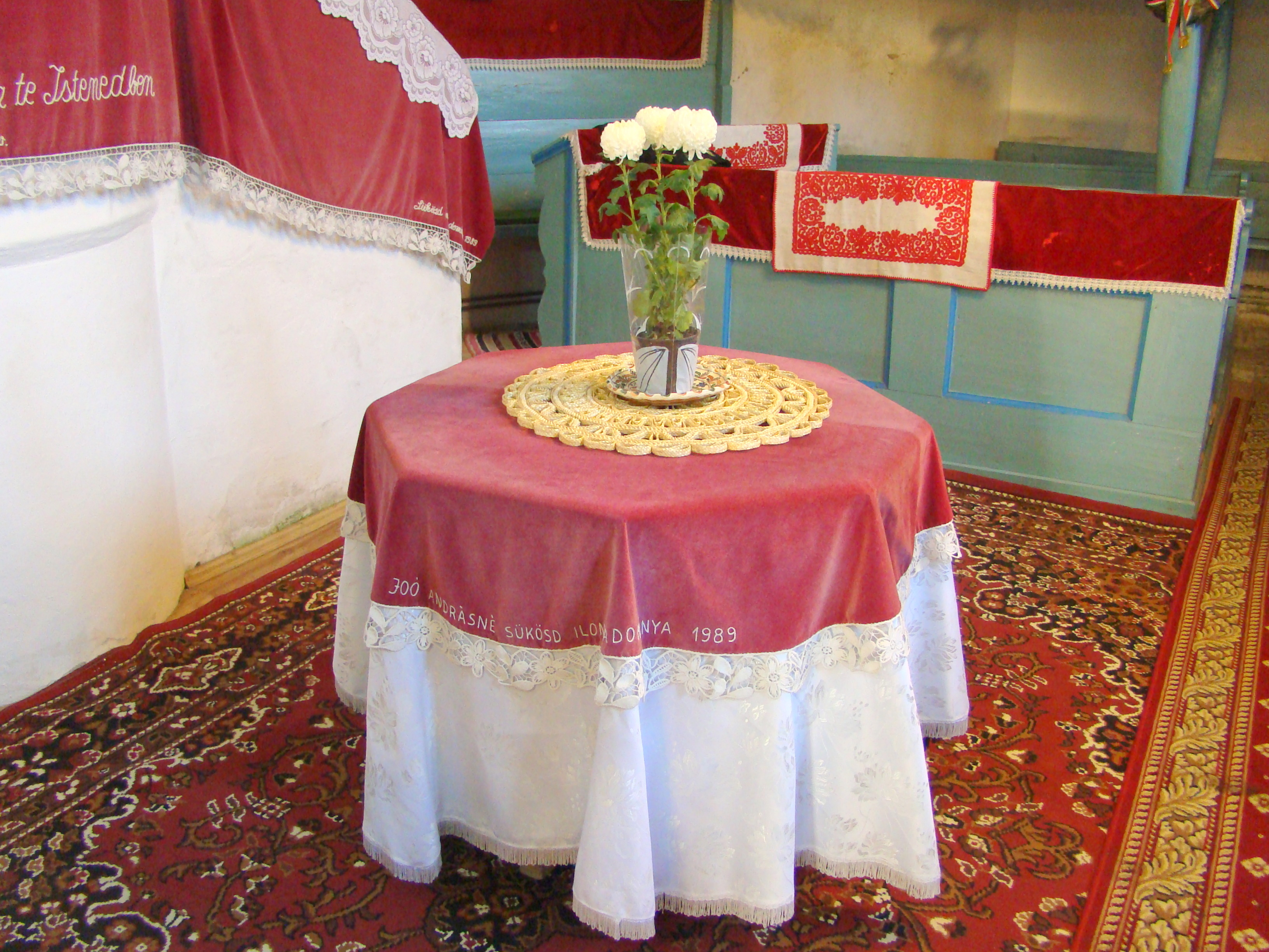 Biserica reformată din Trei Sate (fostul sat Cioc), comuna Ghindari, judeţul Mureş